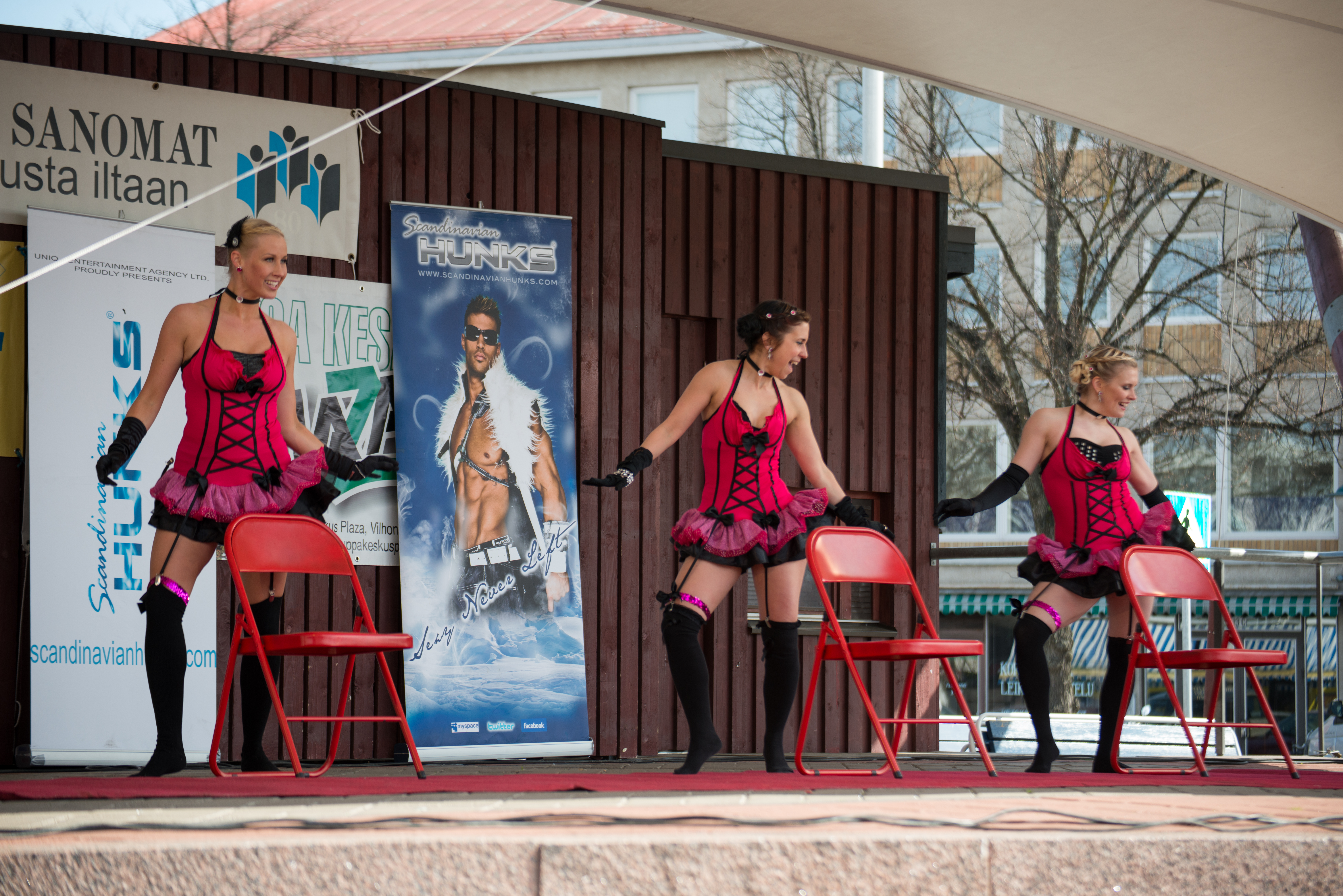 Burleski esitys